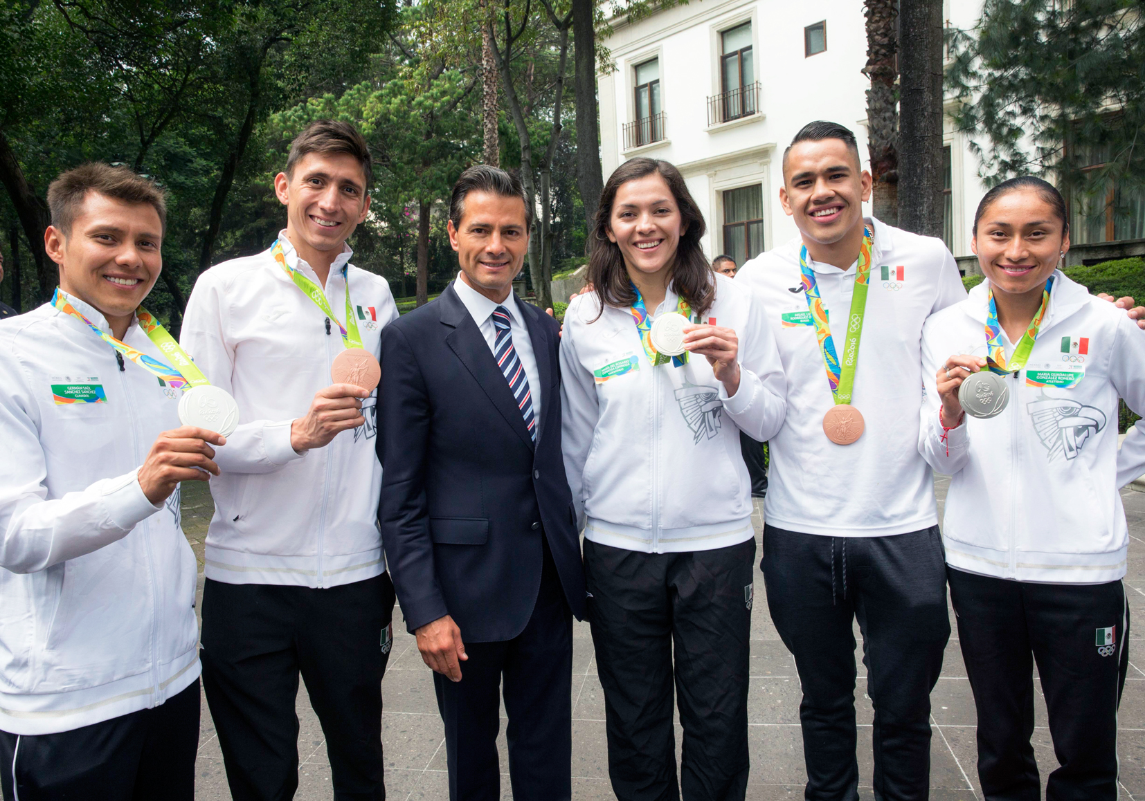 Left to right: diver Germán Sánchez, pentathlete Ismael Hernández, President Enrique Peña Nieto, taekwondo practitioner María Espinoza, boxer Misael Rodríguez and racewalker María Guadalupe González. El Presidente Enrique Peña Nieto se reunió hoy con los deportistas que integraron la delegación mexicana que participó en los Juegos Olímpicos de Río de Janeiro 2016, a quienes les expresó su reconocimiento por el esfuerzo, la entrega, el empeño y el coraje que demostraron en esta justa olímpica y durante el proceso para llegar a ella.